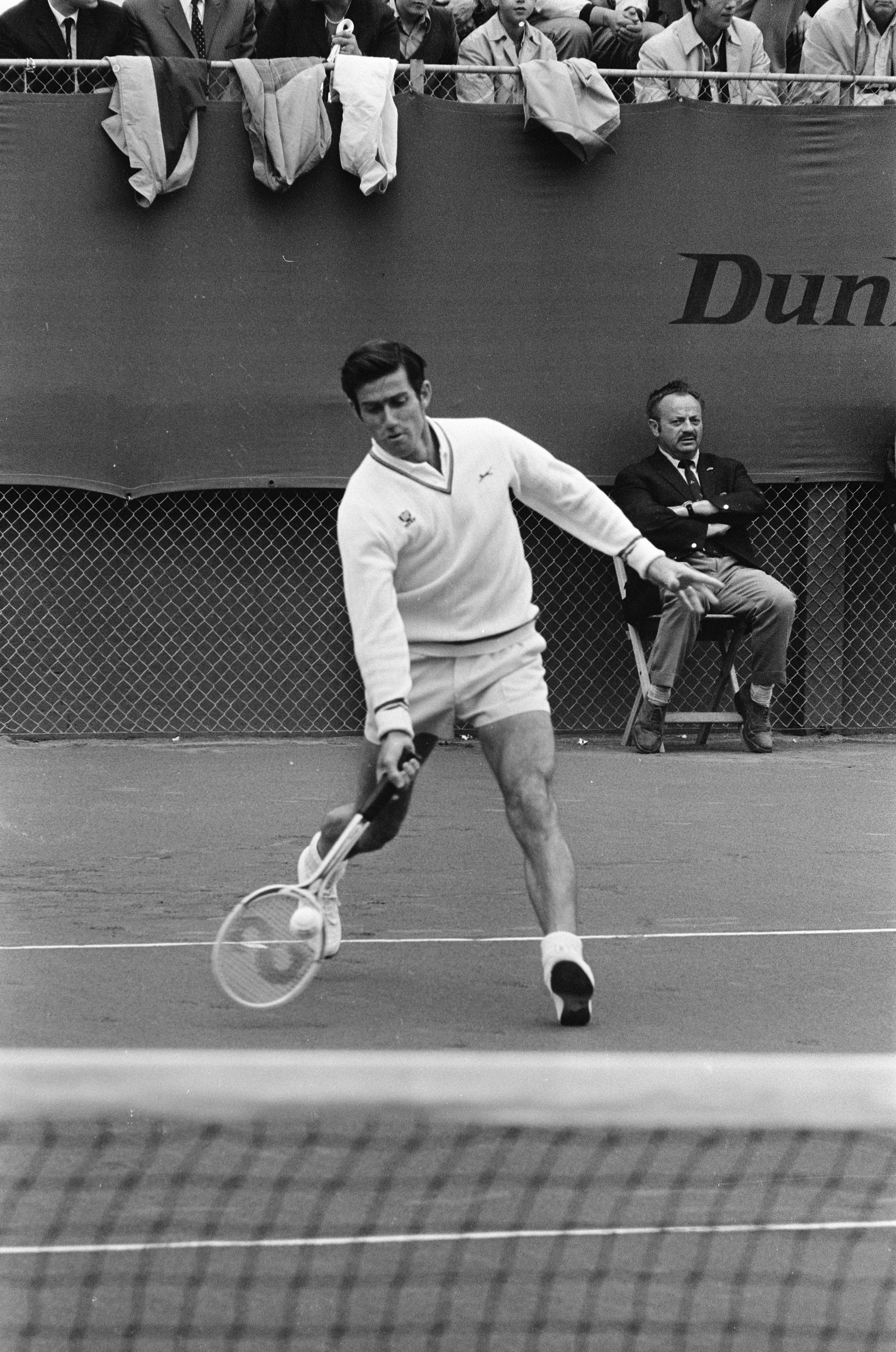 Collectie / Archief : Fotocollectie Anefo Reportage / Serie : Tennistoernooi op MWTS-banen te Scheveningen; Ken Rosewa in aktie (tegen Okker) Beschrijving : De Australiër Ken Rosewall in actie tegen Tom Okker Datum : 5 juli 1970 Locatie : Scheveningen, Zuid-Holland Trefwoorden : tennis, toernooien Persoonsnaam : Rosewall, Ken Fotograaf : Bert Verhoeff / Anefo, [onbekend] Auteursrechthebbende : Nationaal Archief Materiaalsoort : Negatief (zwart/wit) Nummer archiefinventaris : bekijk toegang 2.24.01.05 Bestanddeelnummer : 923-6454